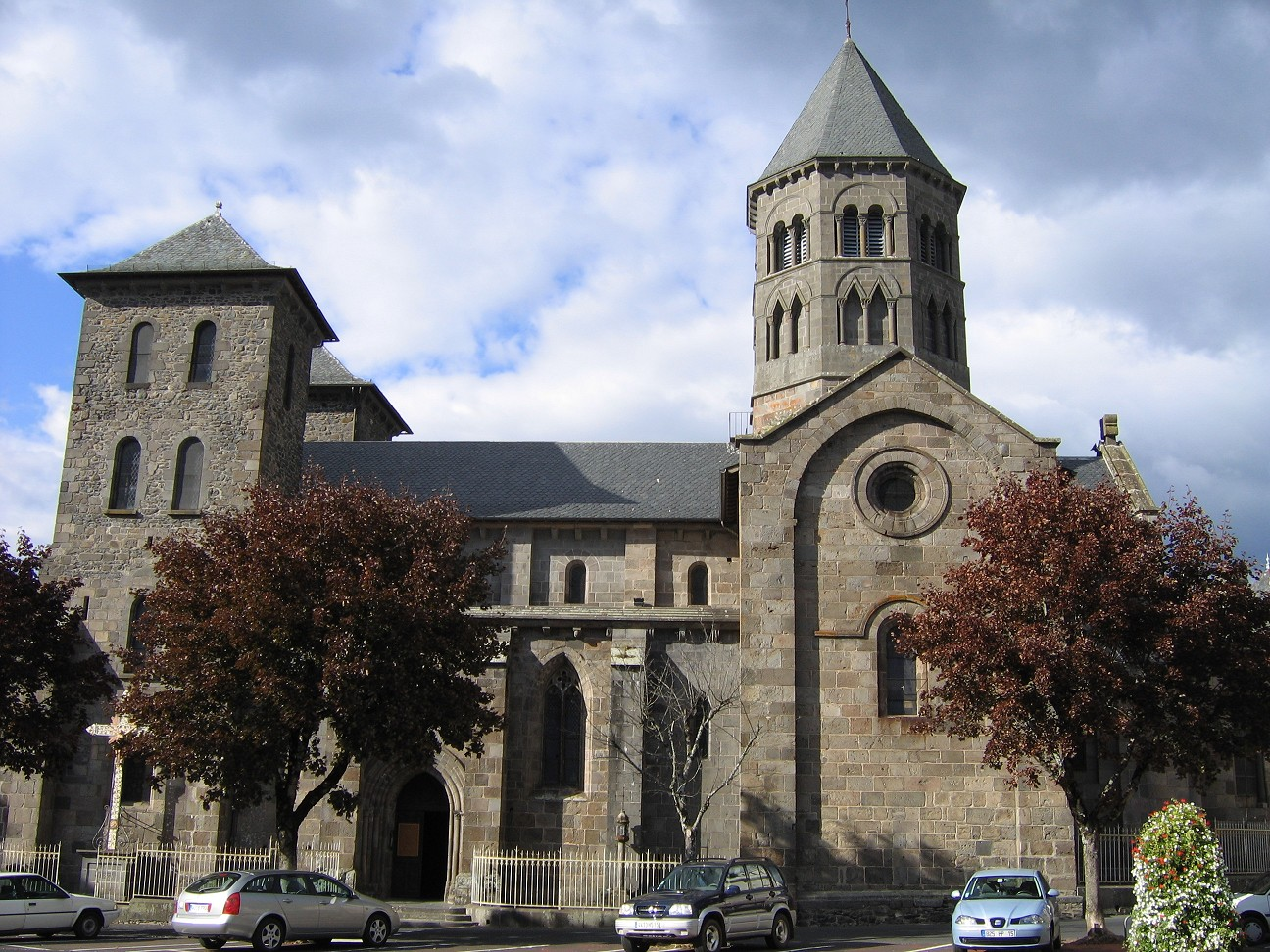 Bildbeschreibung: Mauriac, romanische Kirche Notre Dame des miracles Quelle: Eigene Fotoaufnahme Fotograf: Mussklprozz Datum: de:18. September de:2005 andere Versionen: keine